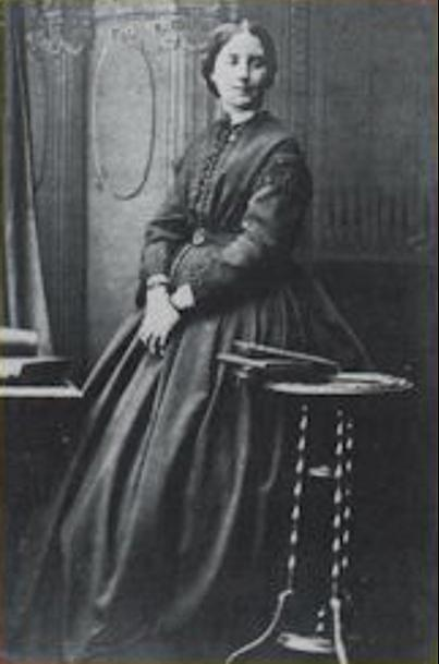 Mary Lutyens nel 1934